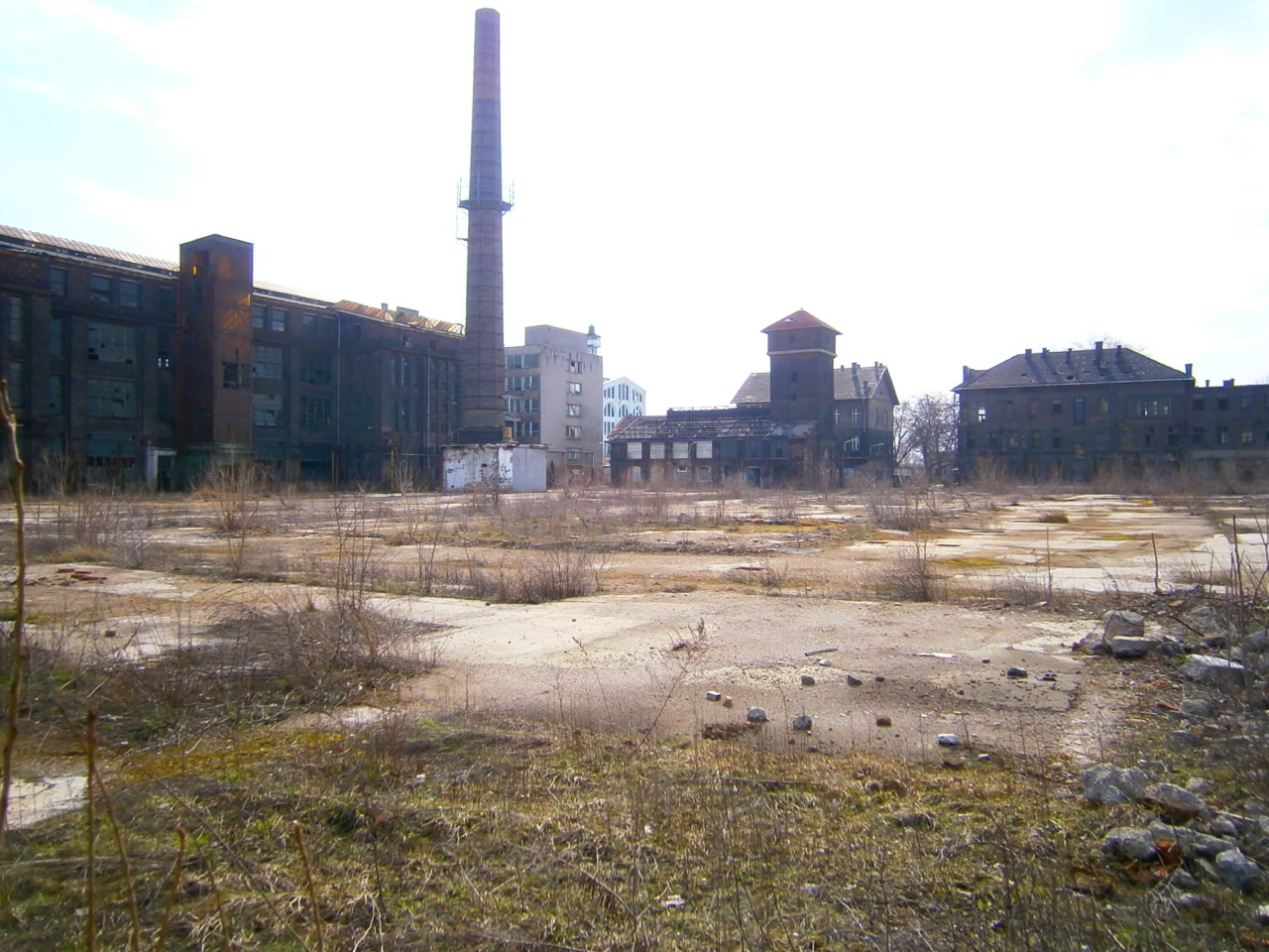 Budapesti FÉG épületei.